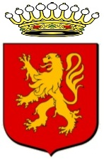 blason des foucault